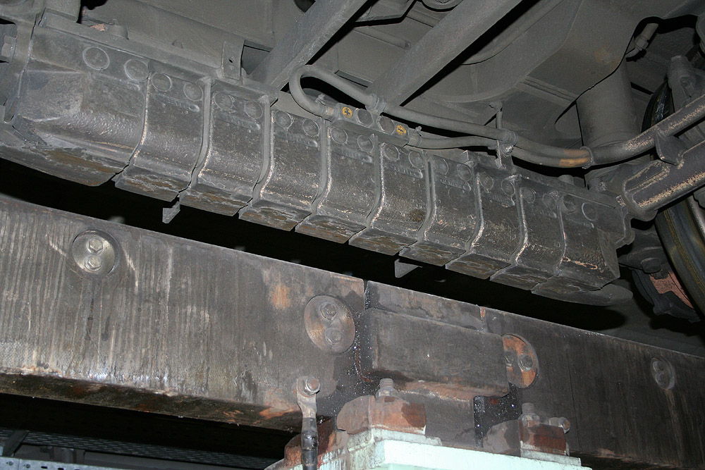 Magnetschienenbremse im Laufgestell eines ICE 1